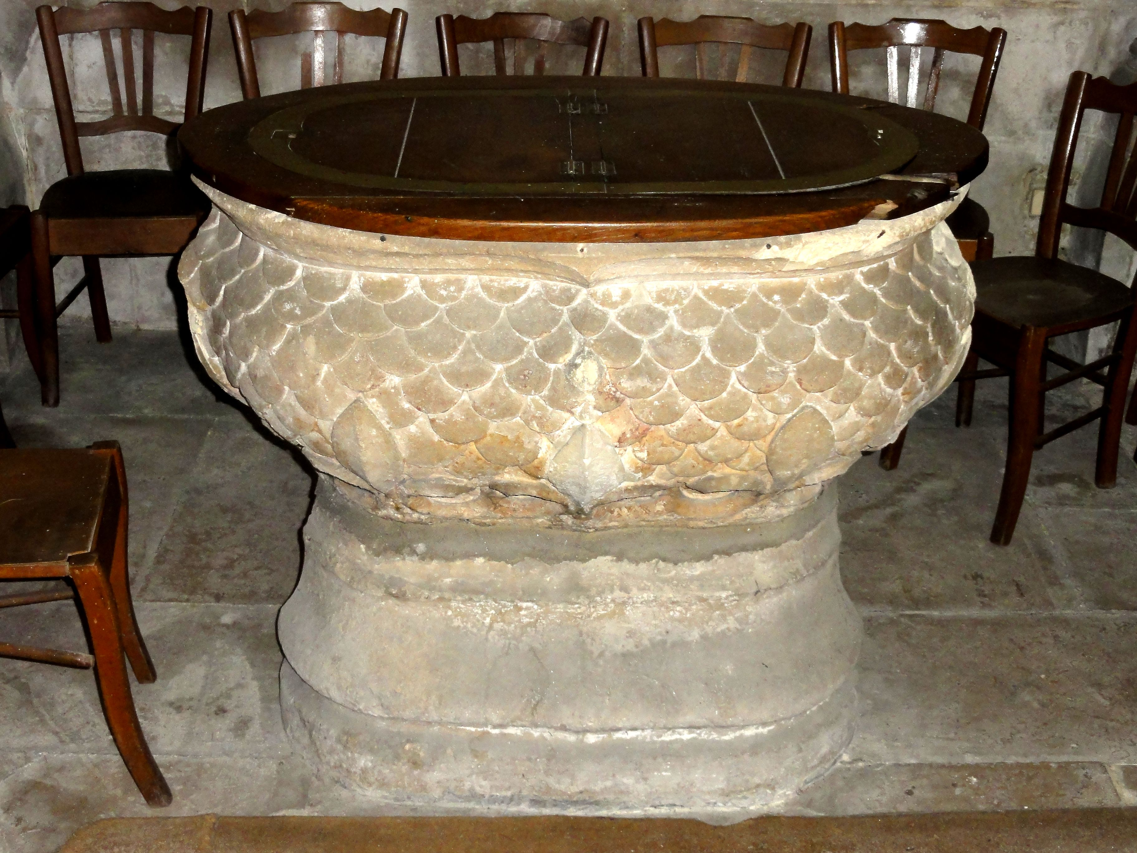 Fonts baptismaux.